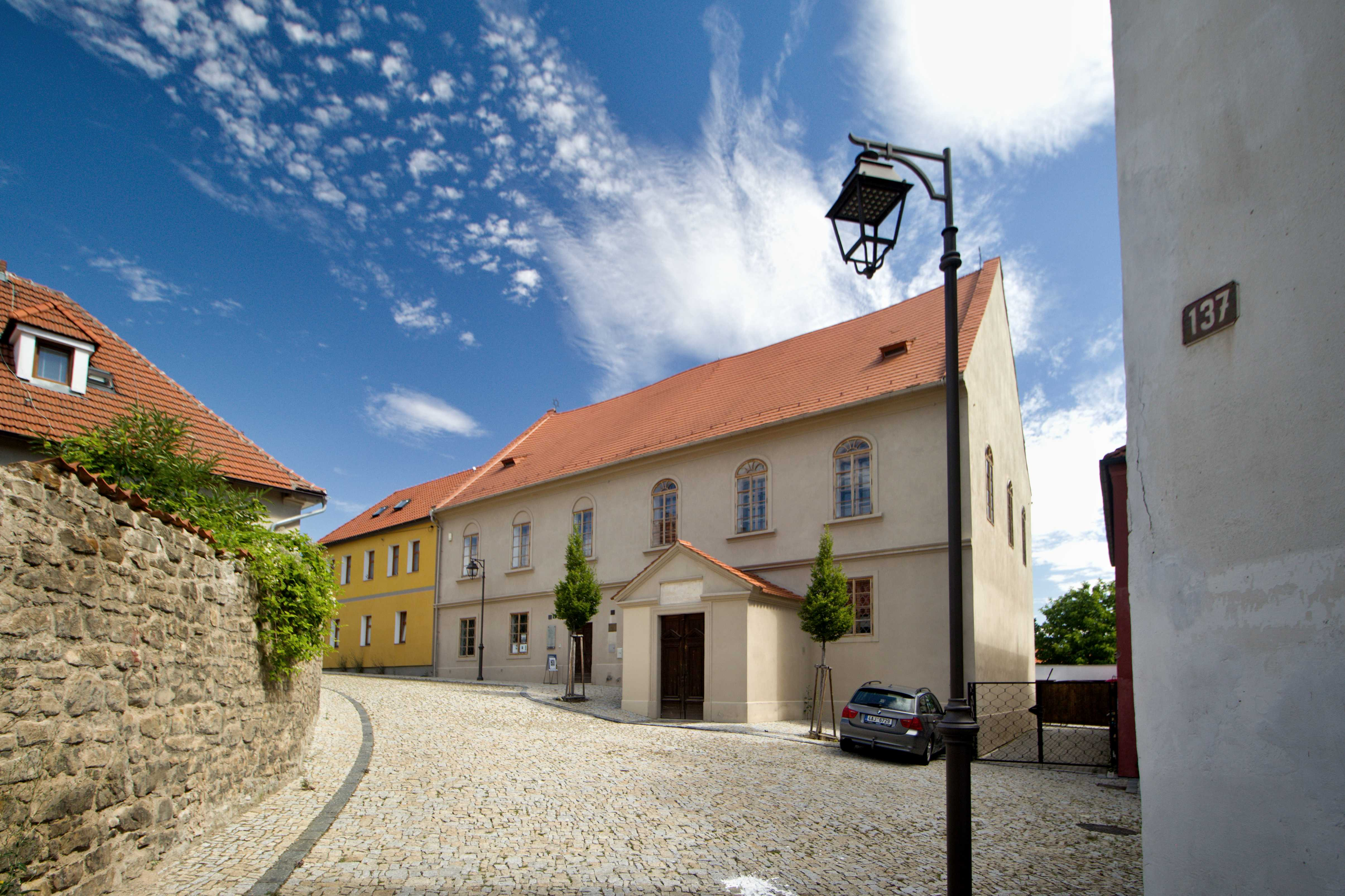 Brandýs nad Labem